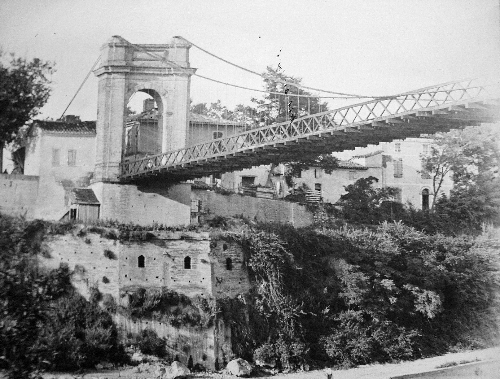 Photo du Pont de mirepoix sur le Tarn